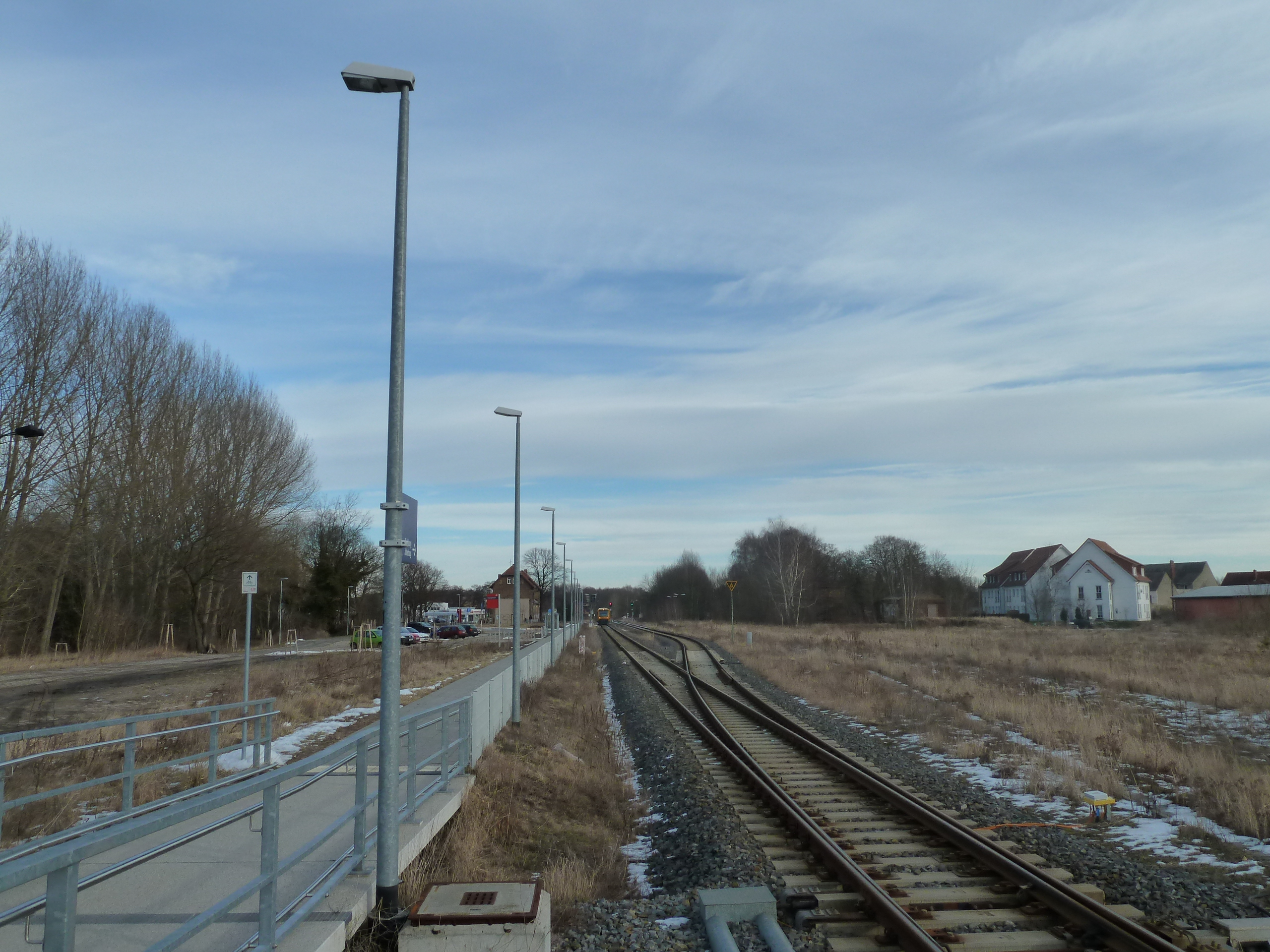 Bahnhof Treuenbrietzen, Bahnsteige. Blicke vom Bahnsteig in Richtung Jüterbog zum Bahnsteig in Richtung Berlin (weit im Hintergrund)